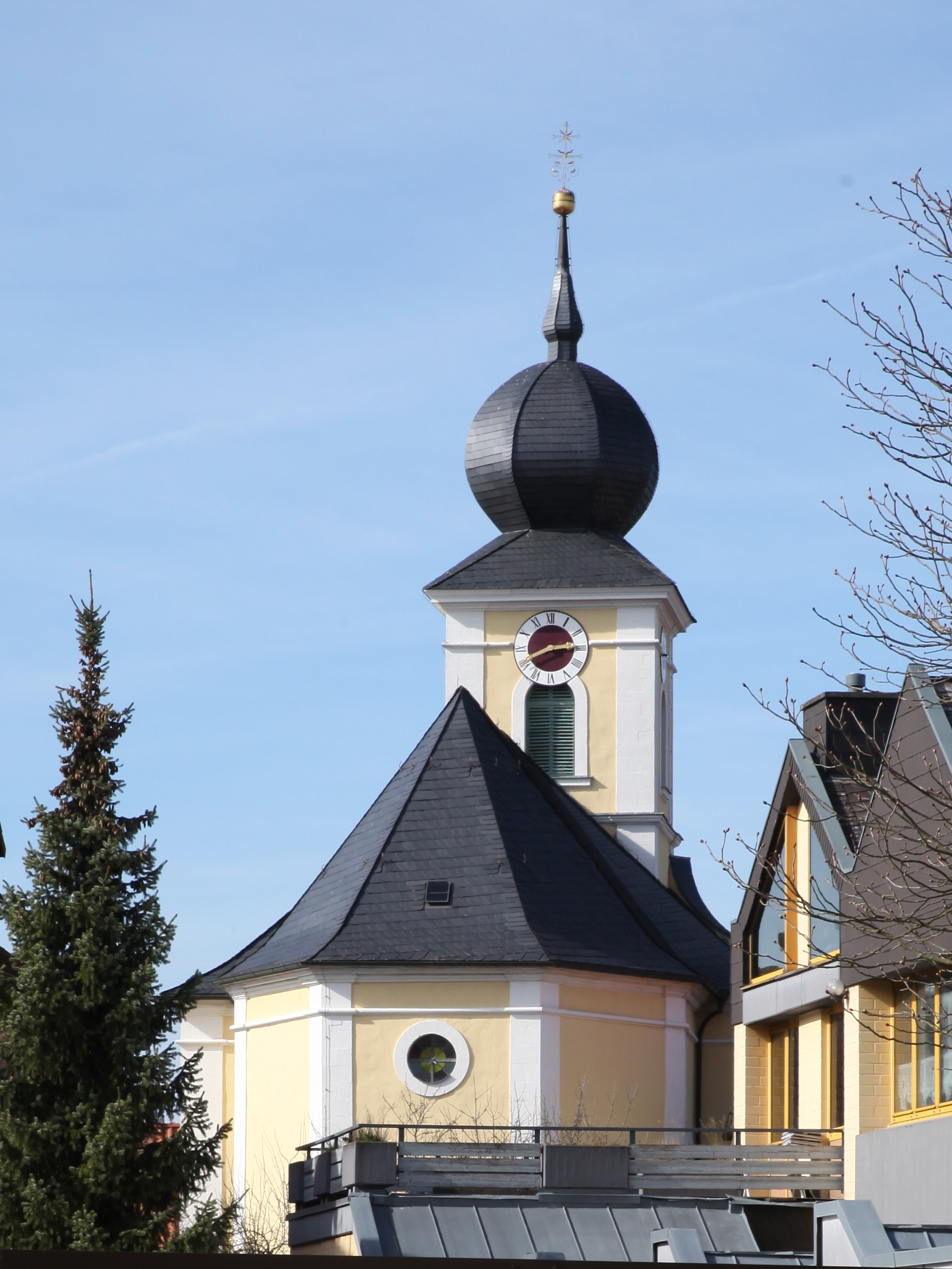 St. Wolfgang in Kaltenbrunn, Itzgrund